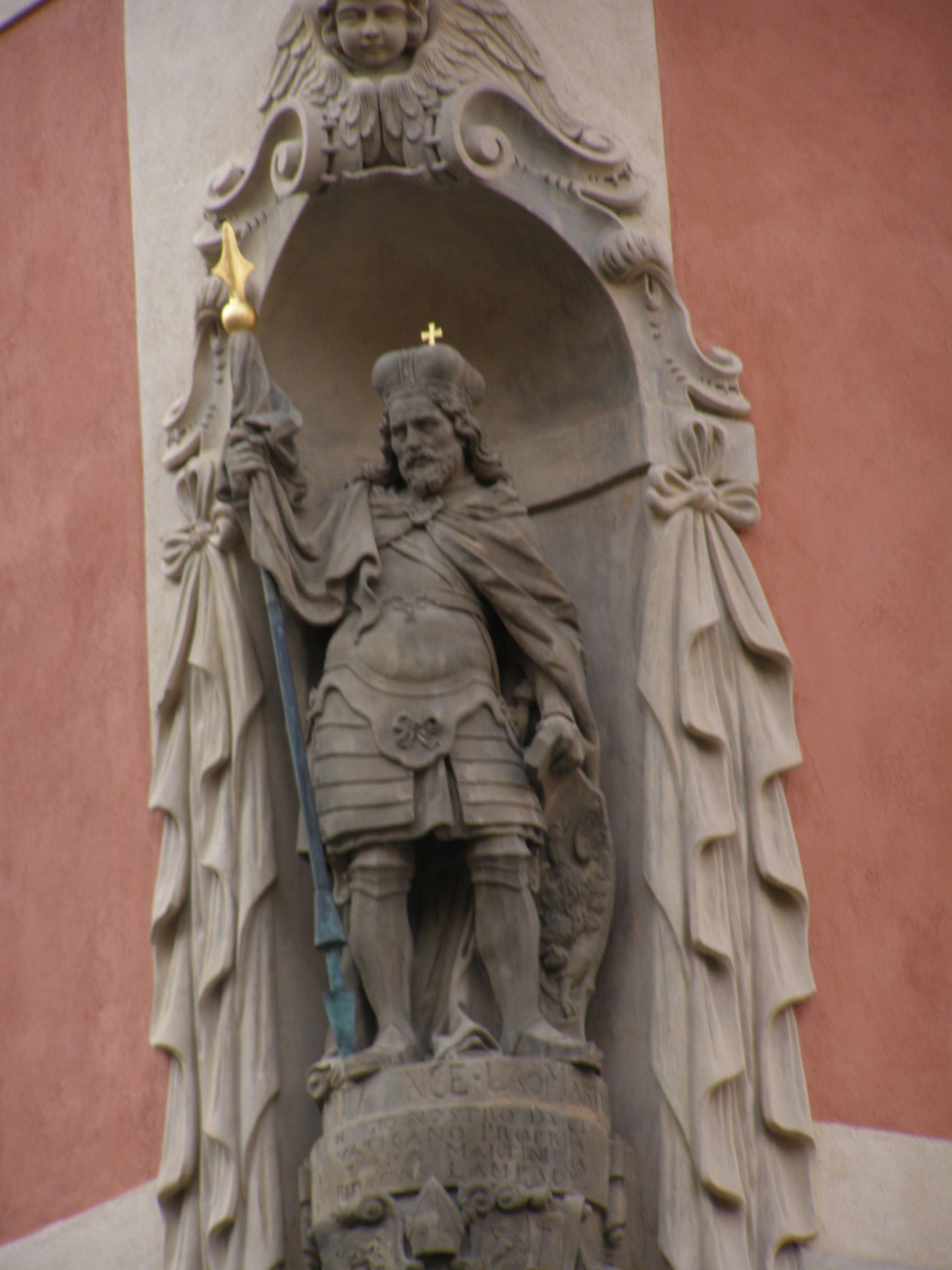 Staré proboštství